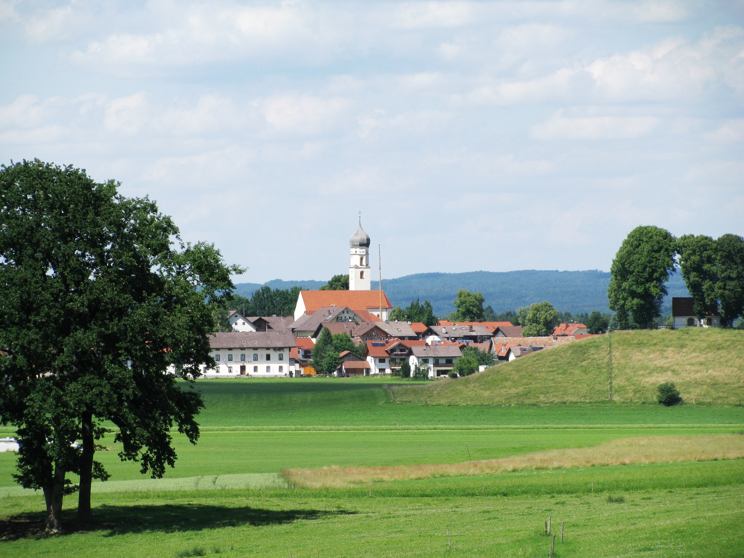 Antdorf im Landkreis Weilheim-Schongau von Süden.